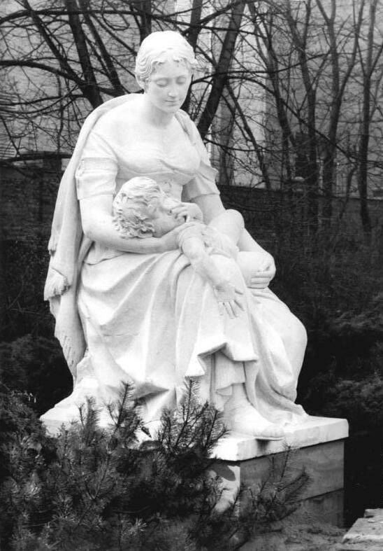 ADN-ZB-Roeske-12.2.88-A-Berlin: Die Plastik" Mutter mit Kind" , 1898 von E. Gomansky geschaffen, erhielt wieder ihren angestammten Platz am Kleinen Bunkerberg im Friedrichshain, nachdem sie von Steinrestauratoren des VEB Denkmalpflege einer Schönheitskur unterzogen worden war."